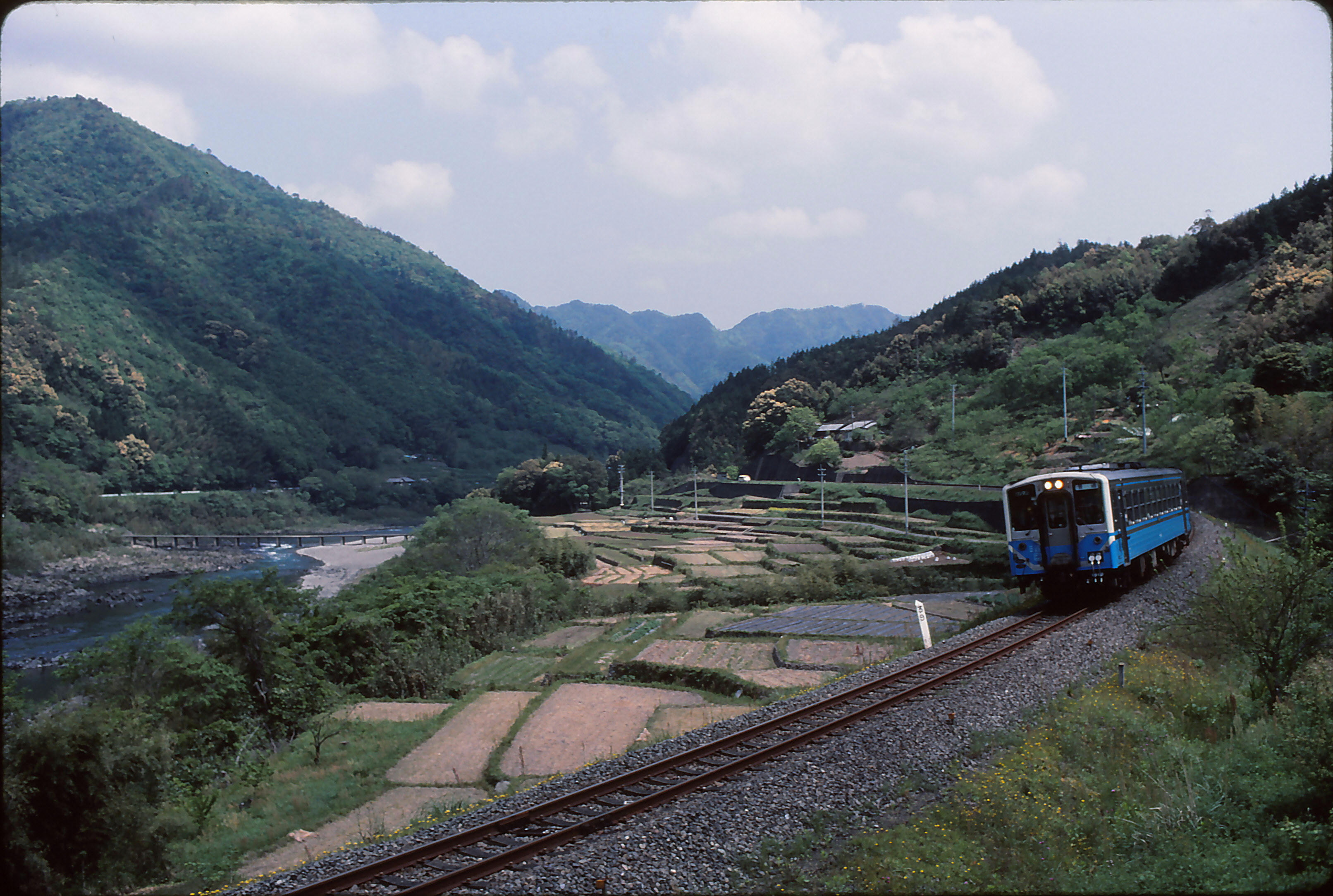 予土線 十川駅-半家駅